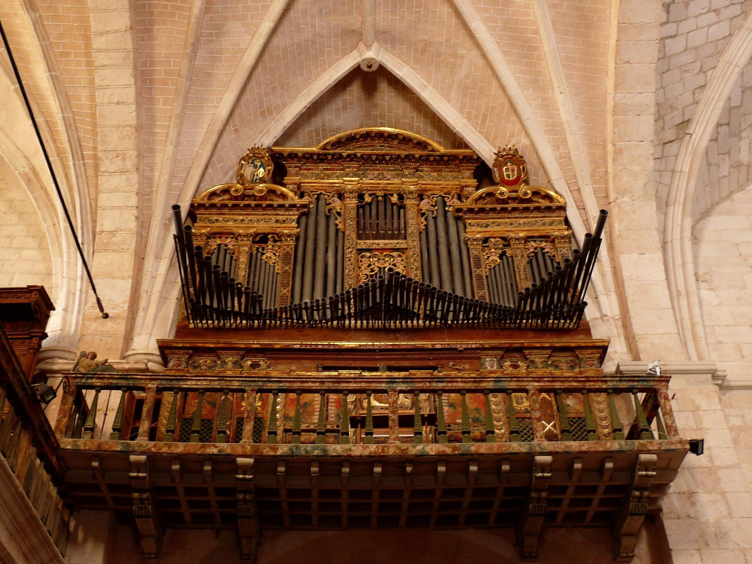 Monaterio de Santa María de Huerta - Interior de la iglesia - Órgano (ha. 1633; reformas en 1707-1710, 1745, 1760 (pintura), 1832, 1953, 1957 y 1959)